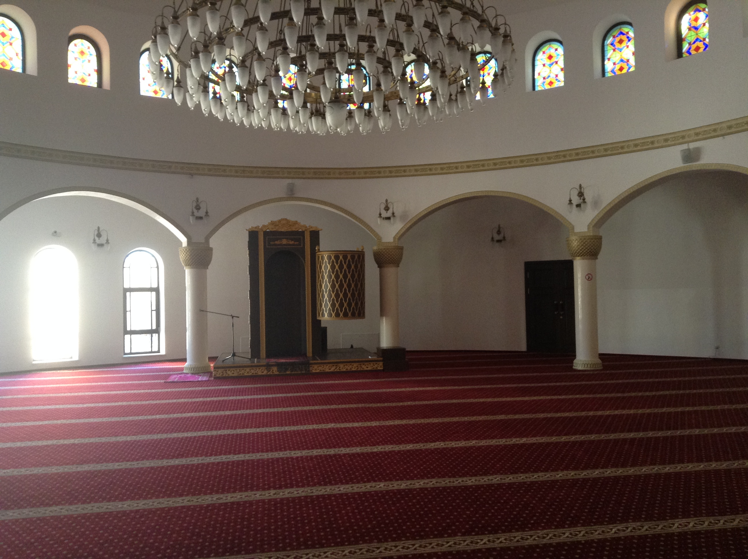 Мечеть Ар-Рахма, Київ, Україна. Ar-Rahma Mosque, Kyiv, Ukraine